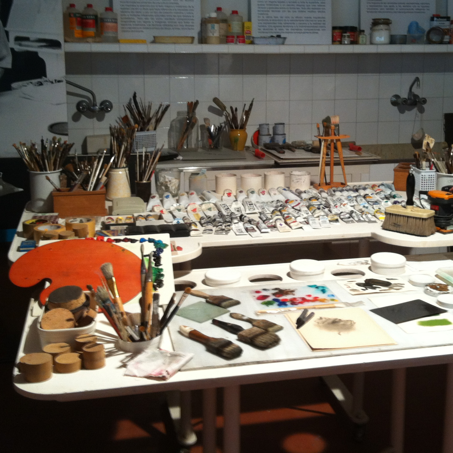 Table de travail et couleurs de Modest Ciuxart à Palafrugell